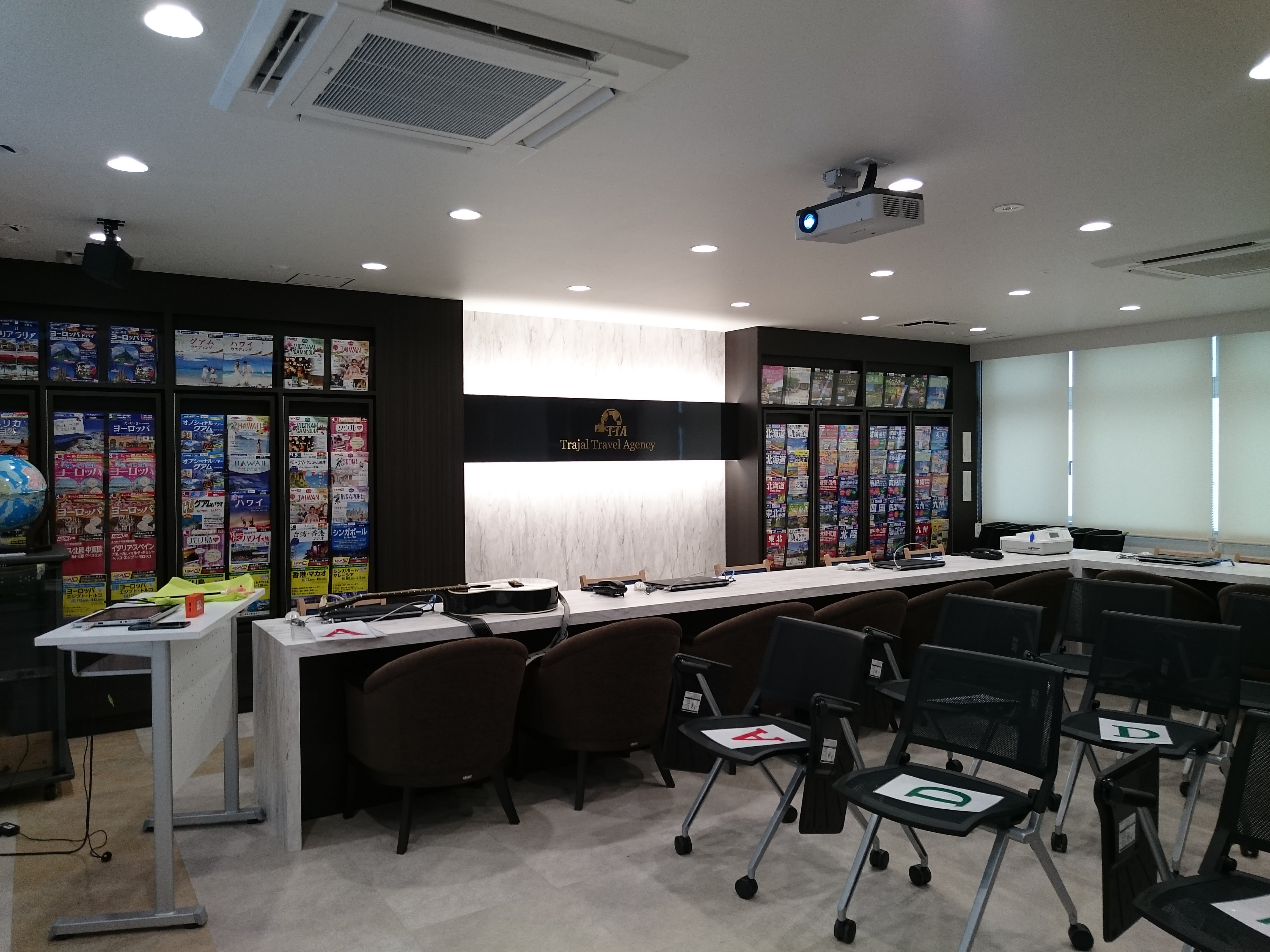 ホスピタリティツーリズム専門学校大阪の旅行業務実習カウンター